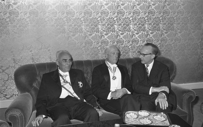 Ordensverleihung an Dr. Wilhelm Vocke in der pakistanischen Botschaft. Verliehen wurde der höchste an Ausländer vergebene Orden "Helal-e-Pakistan".